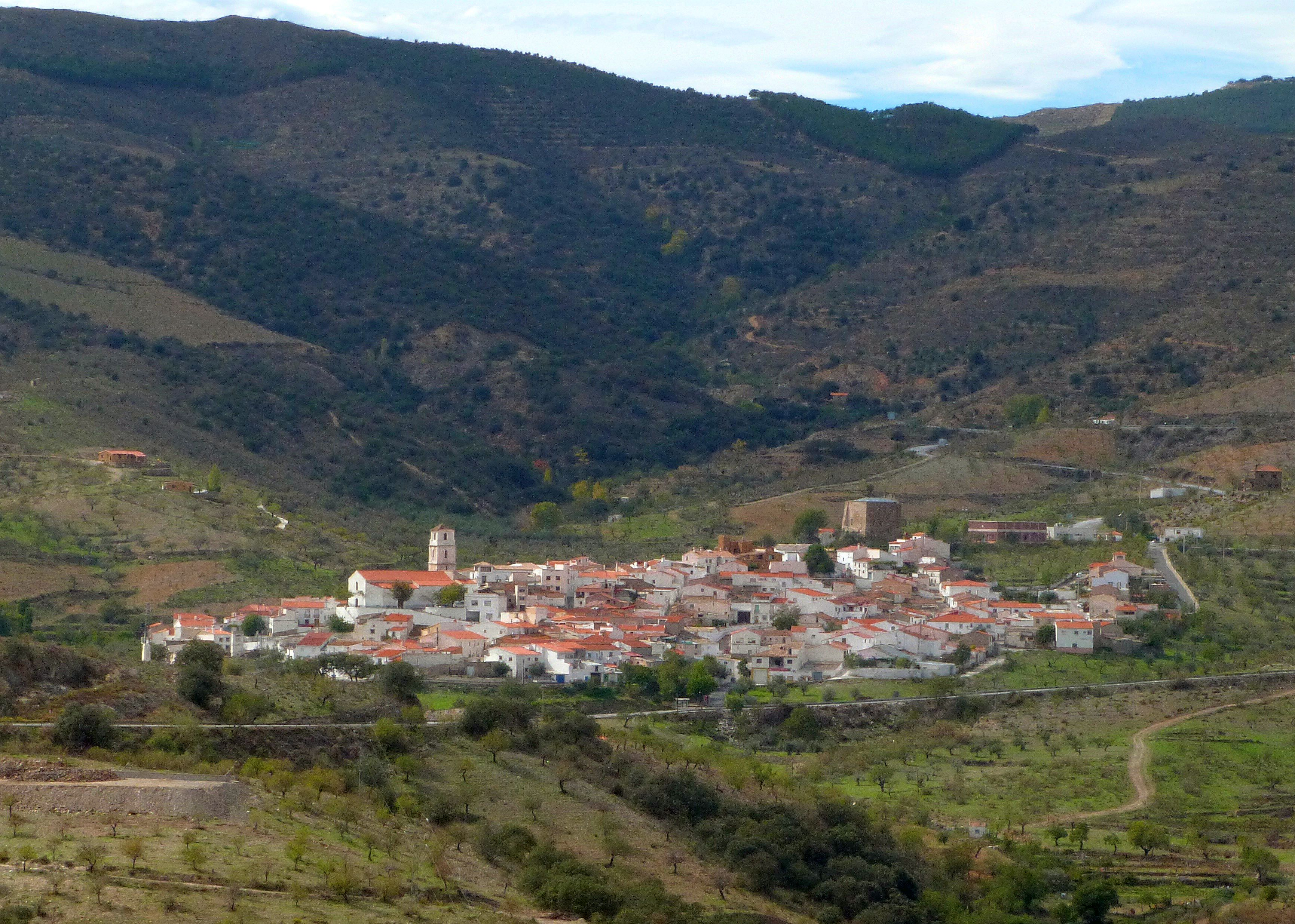 Tahal